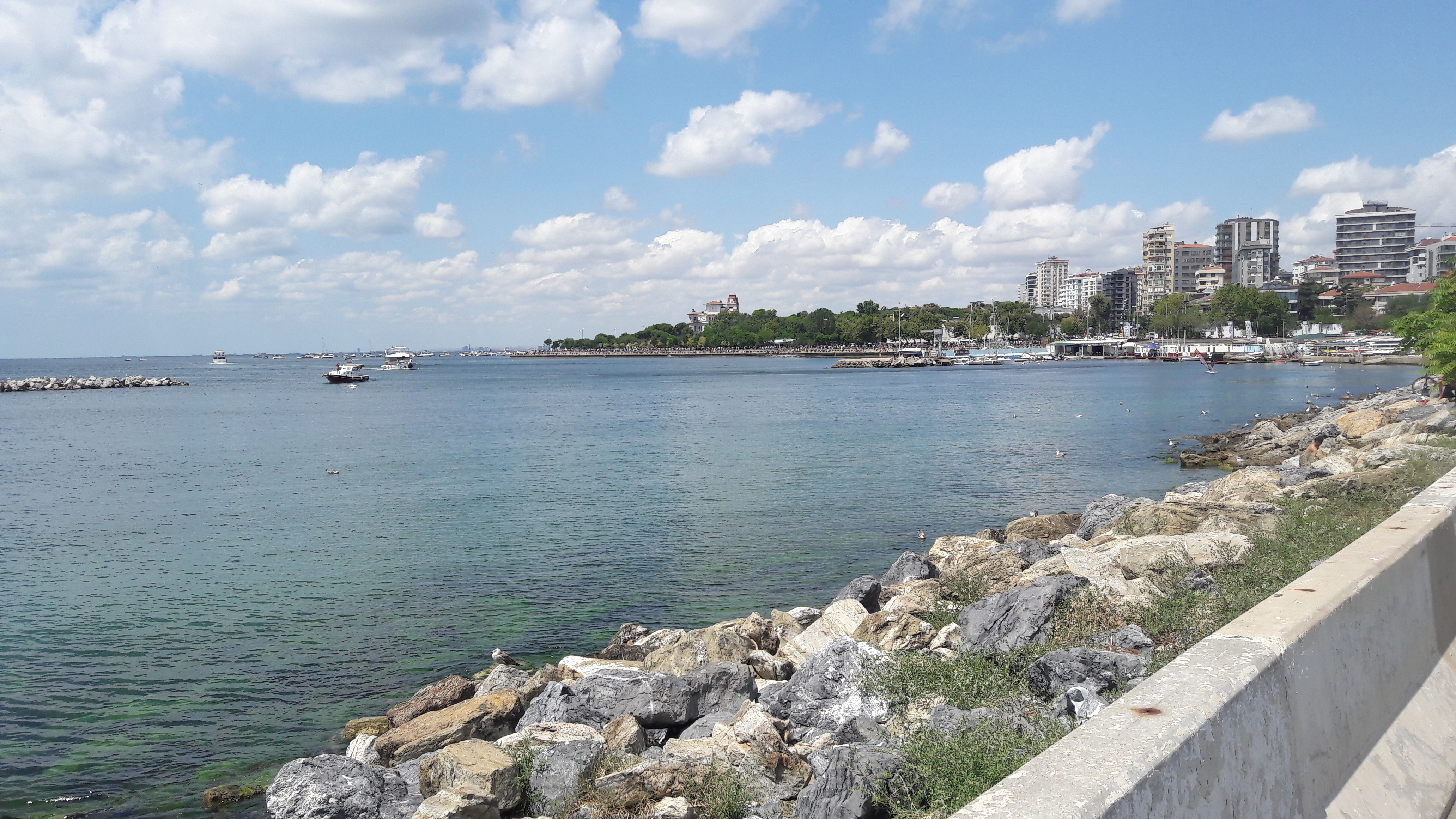 Bostancı Sahili